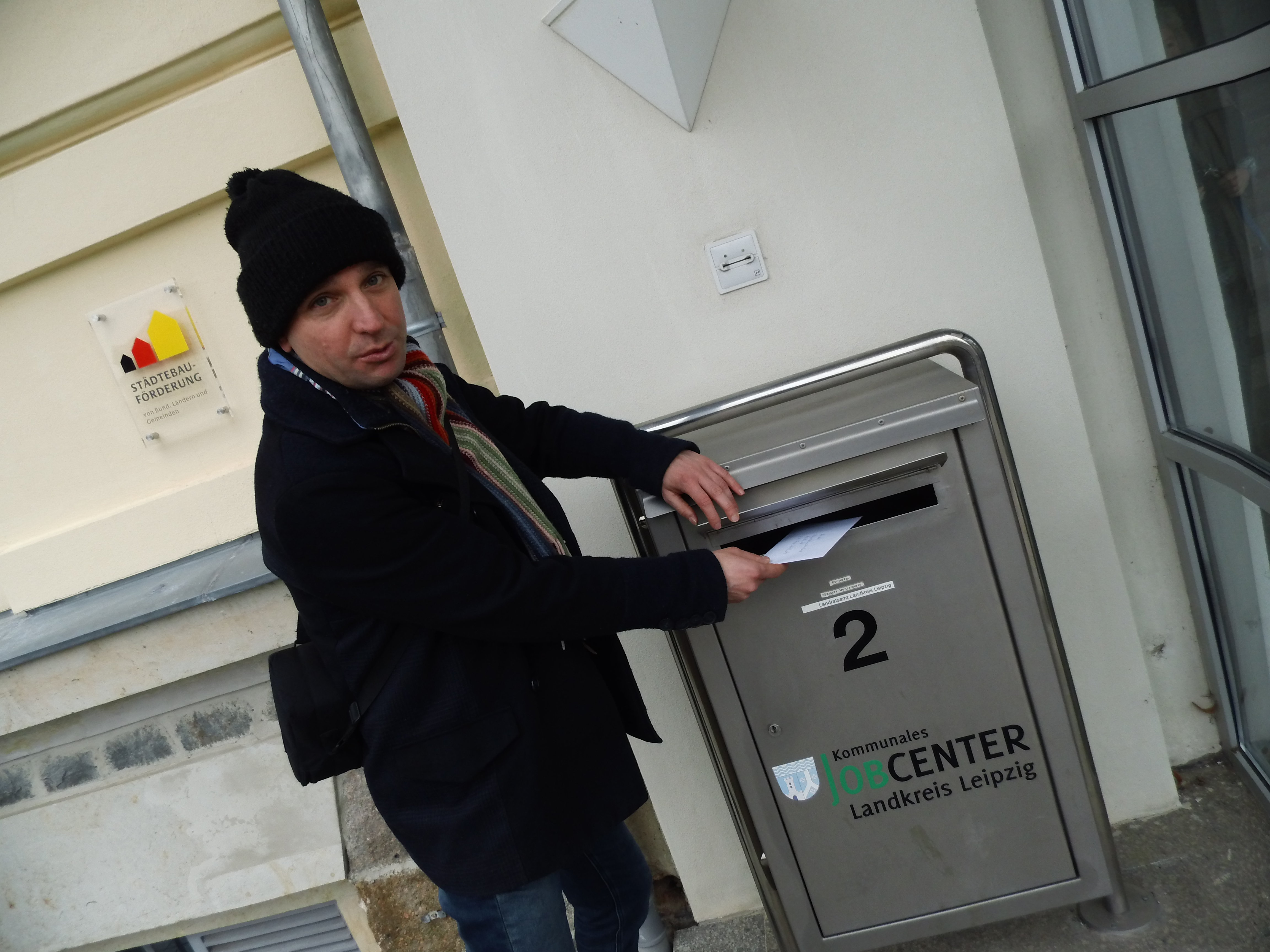 Haig Latchinian, Foto vom März 2015